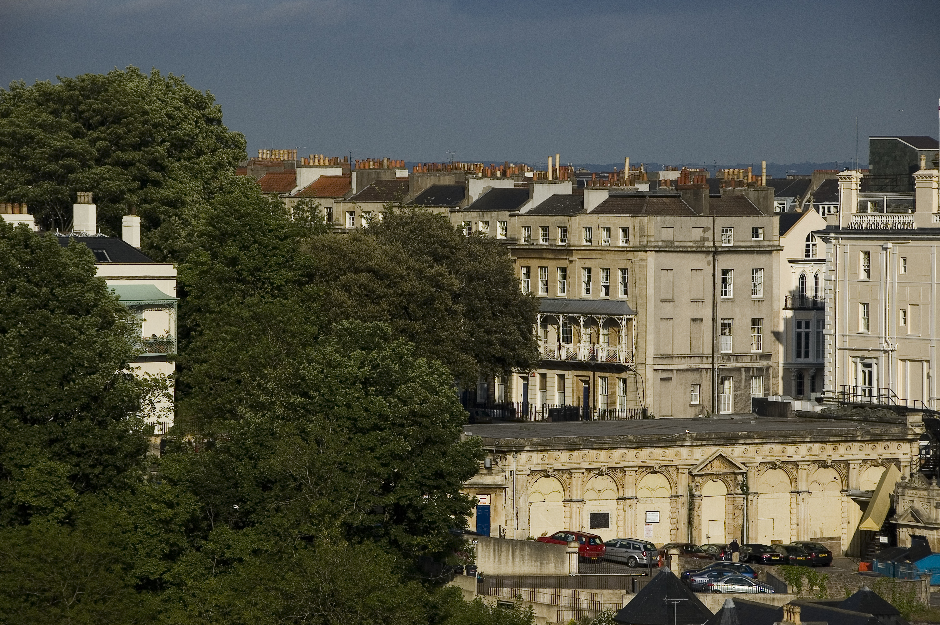 Caledonia Place, Bristol